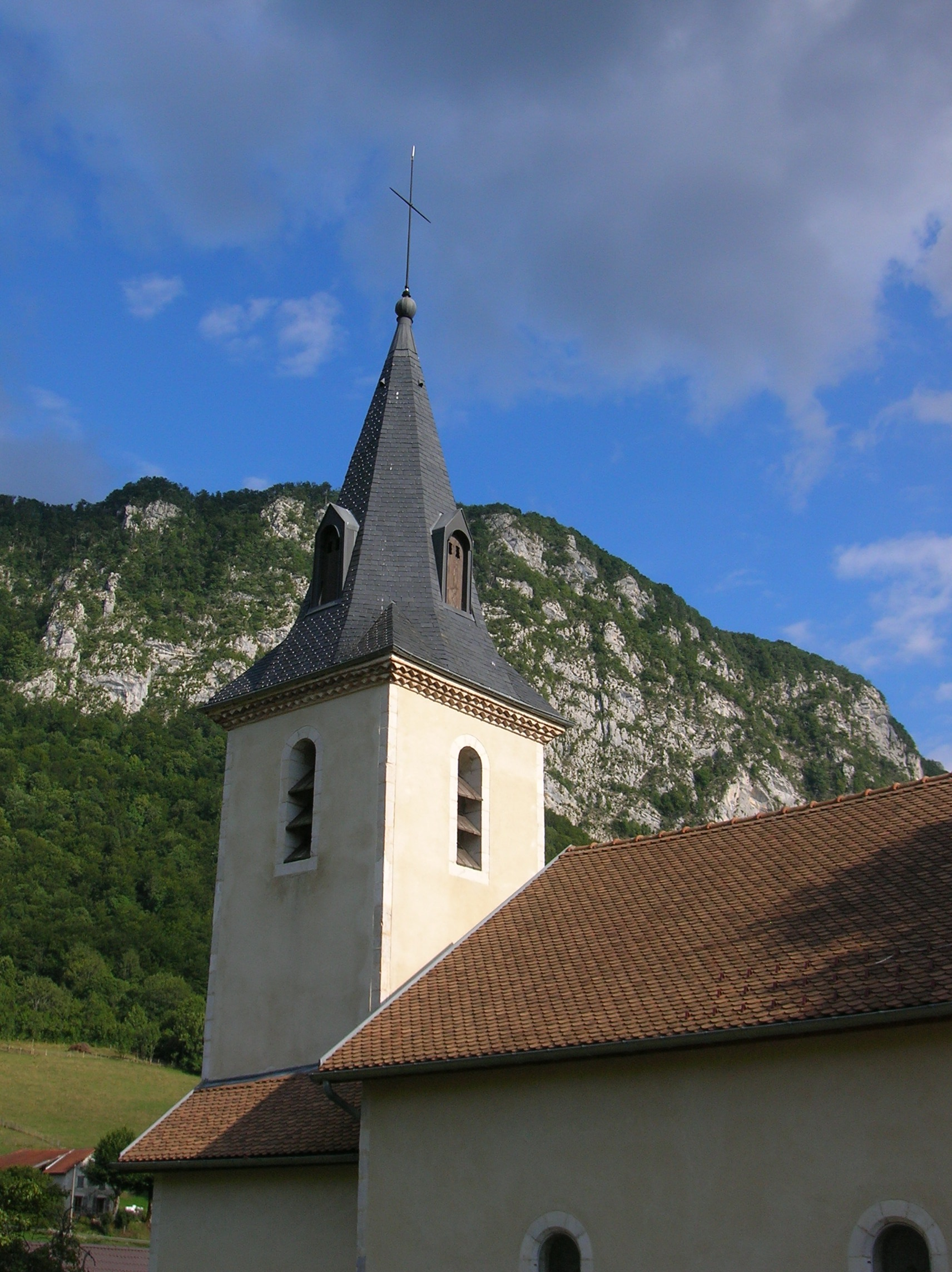 église, Mont-Saint-Martin, Isère